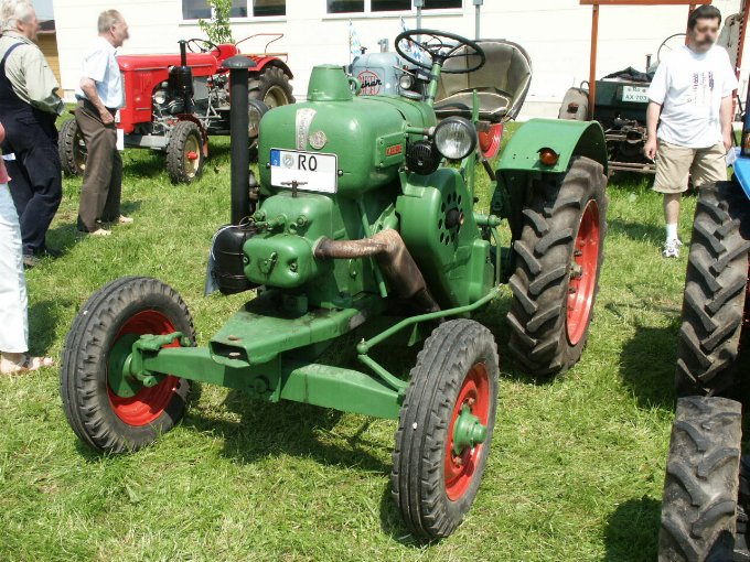 Allgaier-Kaelble R22, Baujahr 1948